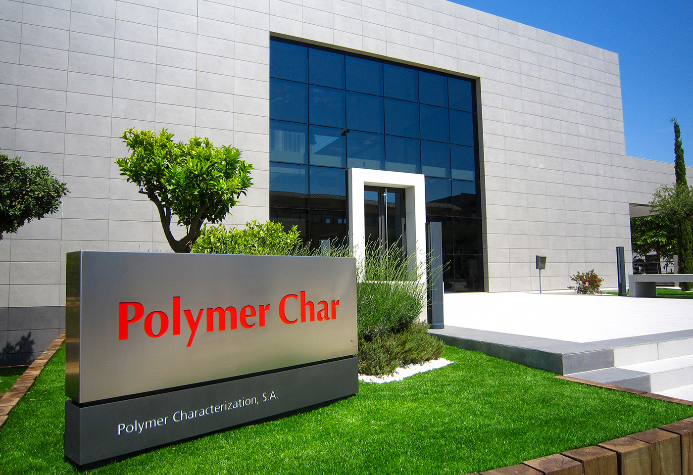 Oficinas centrales de Polymer Char (empresa registrada como Polymer Characterization, S.A.) en el Parque Tecnológico de Valencia. Corporate headquarters of Polymer Char, (Polymer Characterization, S.A.) in the Valencia Technology Park, Spain.